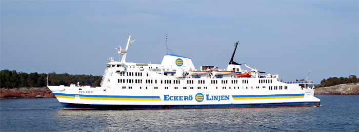 Fartyget Roslagen